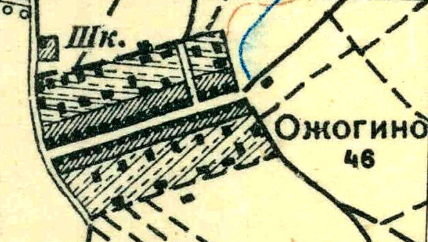 Топографическая карта Ленинградской области, квадрат О-35-24-А-а (Клясина), деревня Ожогино